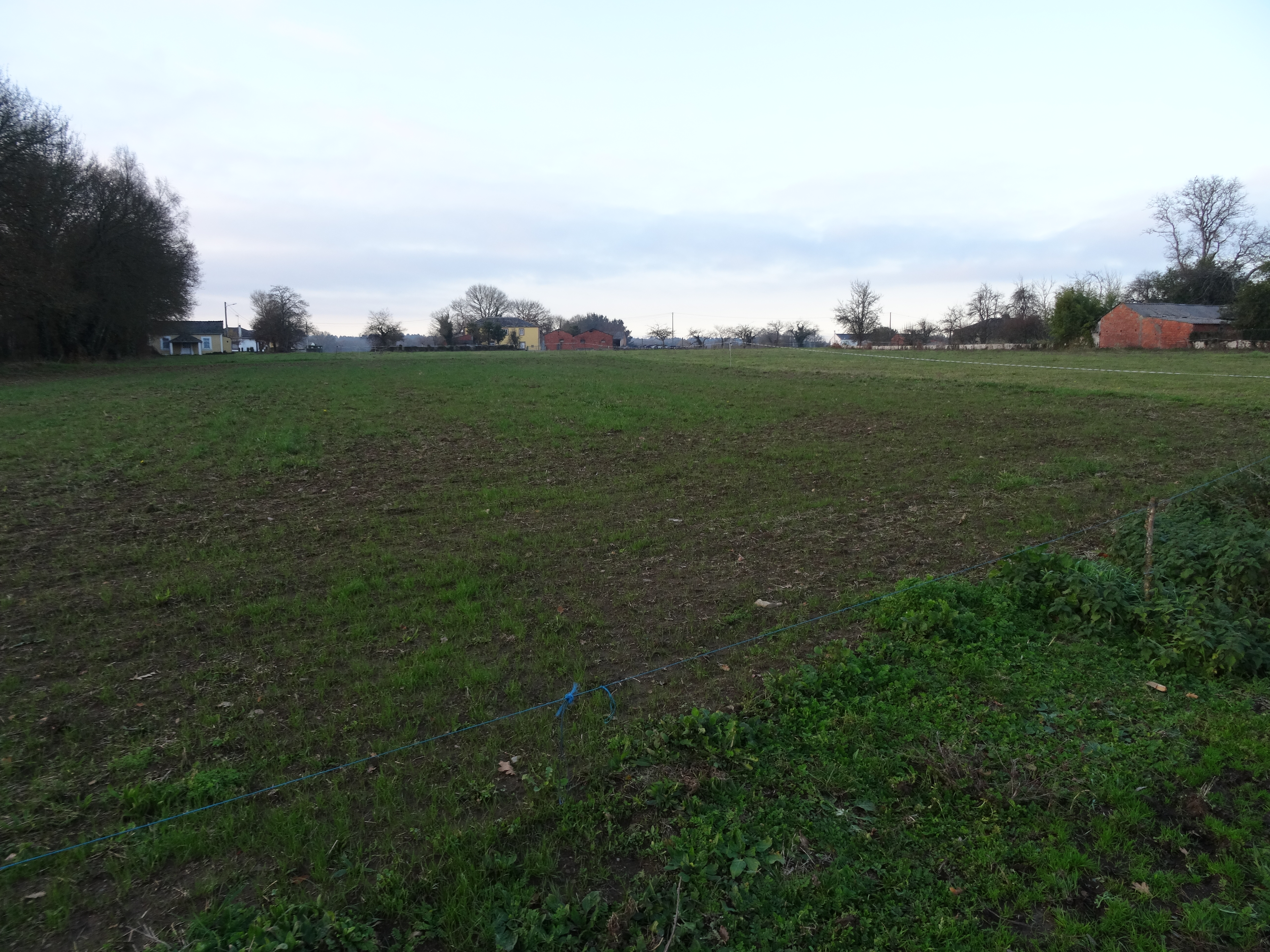 Ver título.